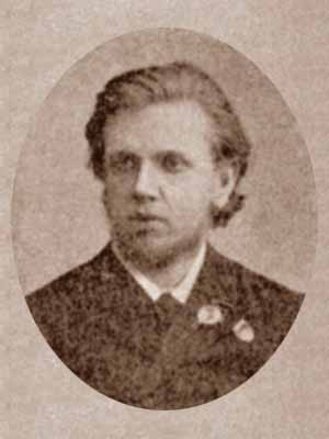 Клейбер, Иосиф Андреевич